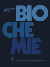 Cover von Biochemie